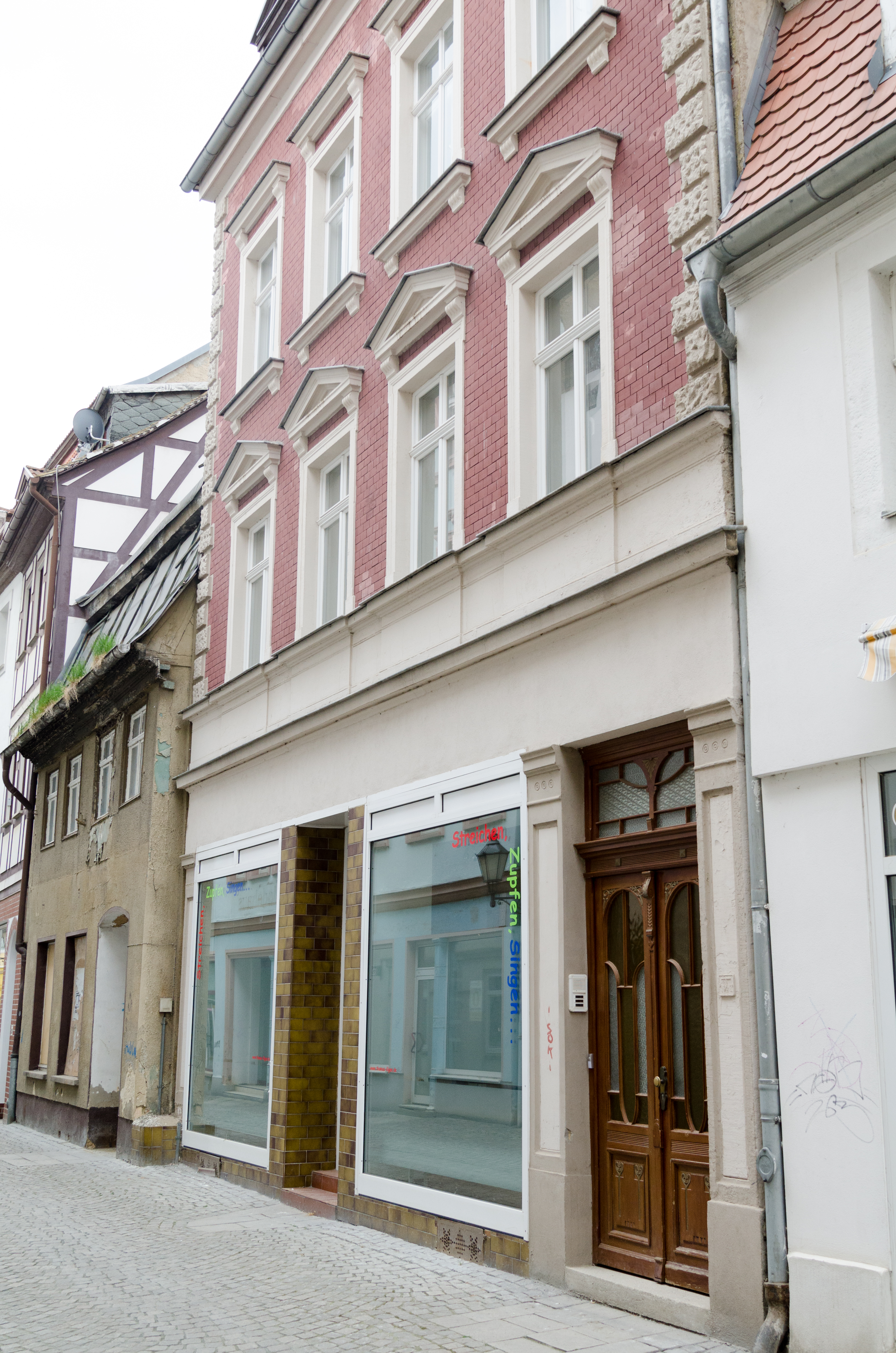 Zeitz, Kramerstraße 22